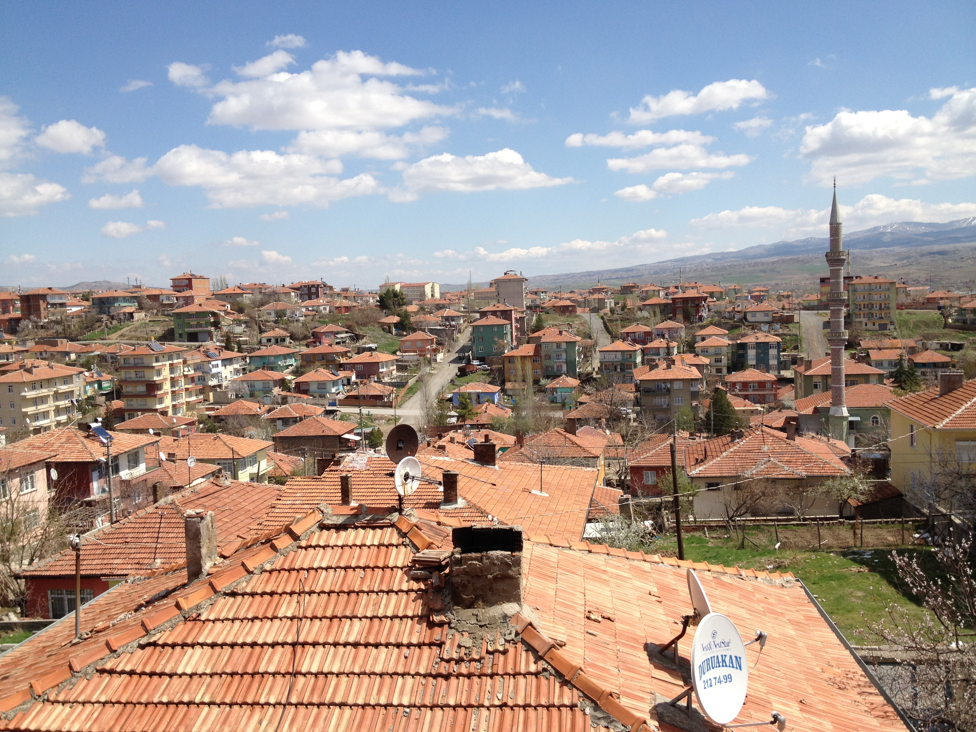 Sanayi Mahallesi